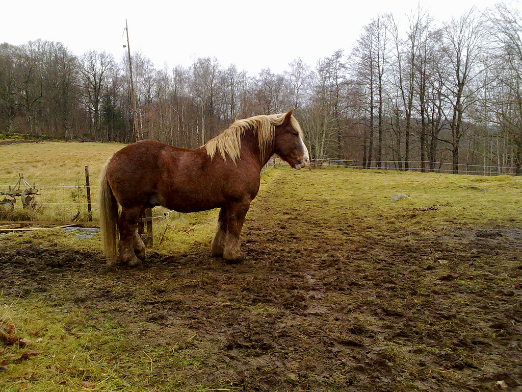 Ståtlig Ardenner som syrrans man ska jobba med i skogen.